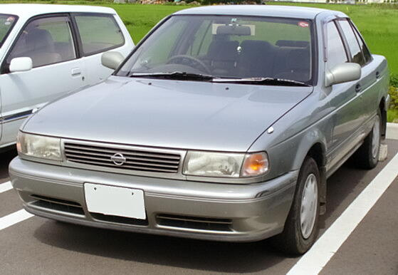 日産・サニー（B13型）